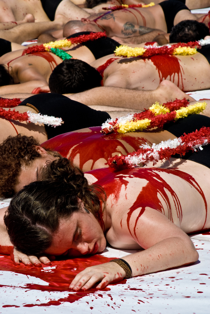 Manifestación antitaurina en Bilbao, España.